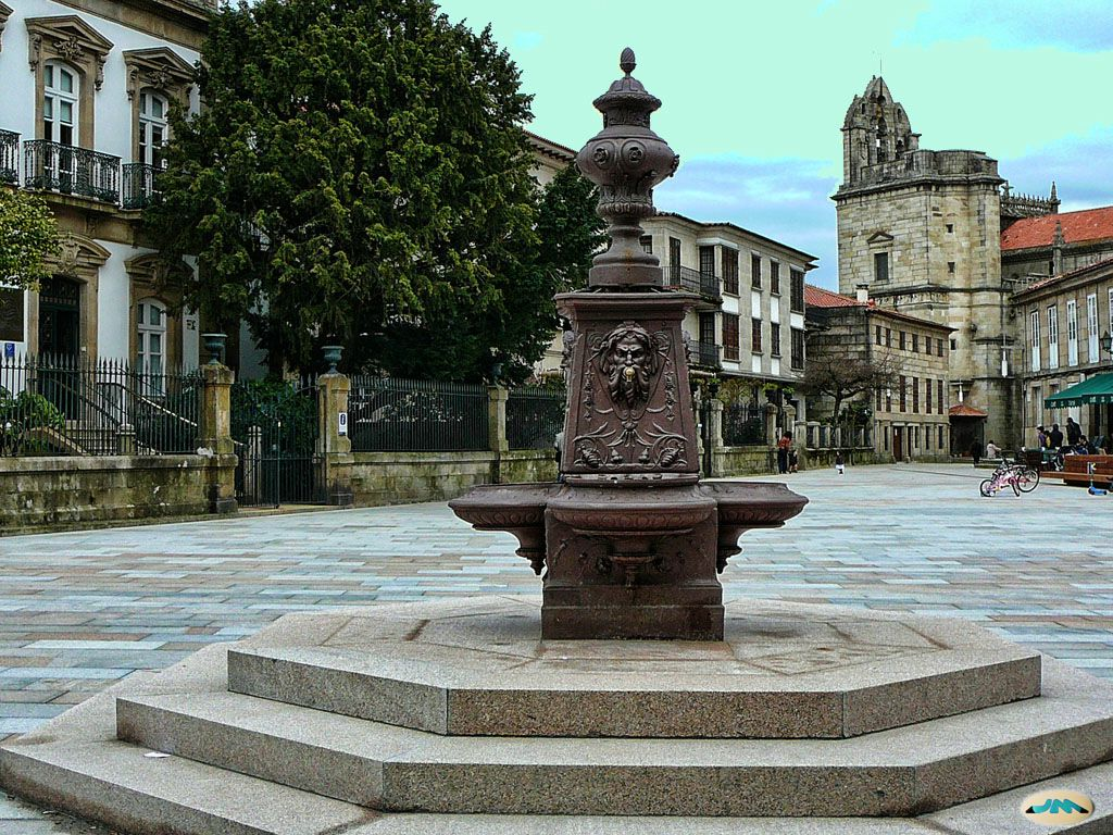 Pontevedra. Avda Santa María